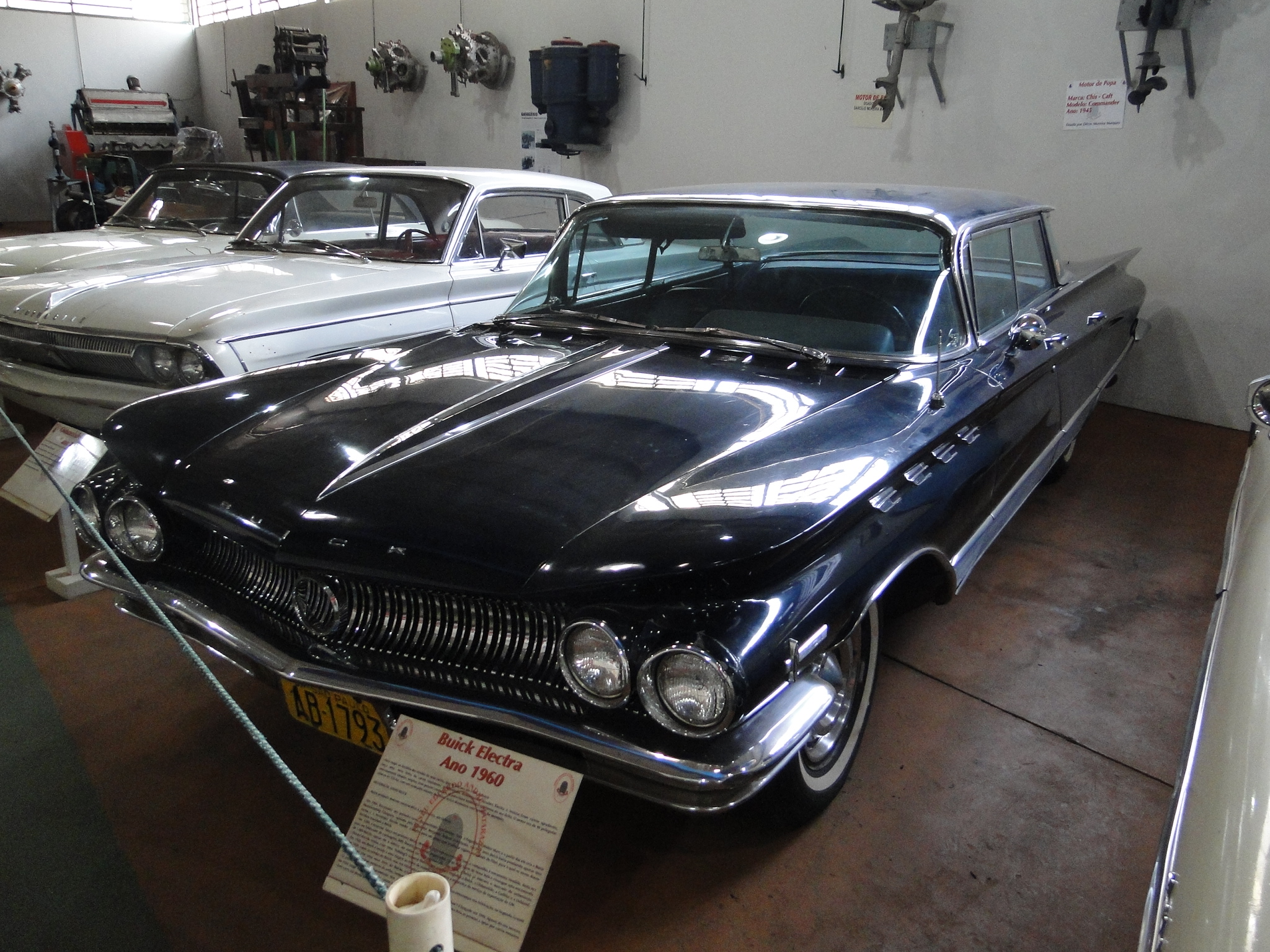 Buick Electra, ano 1960.